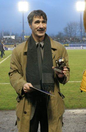 Tomasz Korynt, piłkarz.